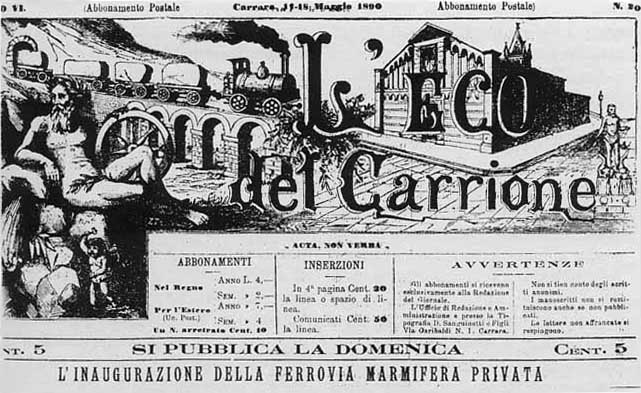 L'inaugurazione della Ferrovia Marmifera Privata di Carrara su "L'Eco del Carrione" (prima pagina) di un edizione del 17-19 Maggio 1890 - Italia.